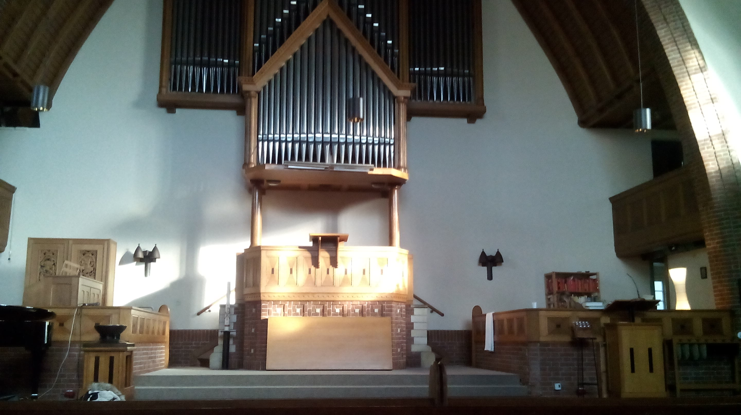 Orgel en preekstoel van de Nassaukerk in Amsterdam in 2017. Linksachter staat een kabinetorgel van Van Vulpen.